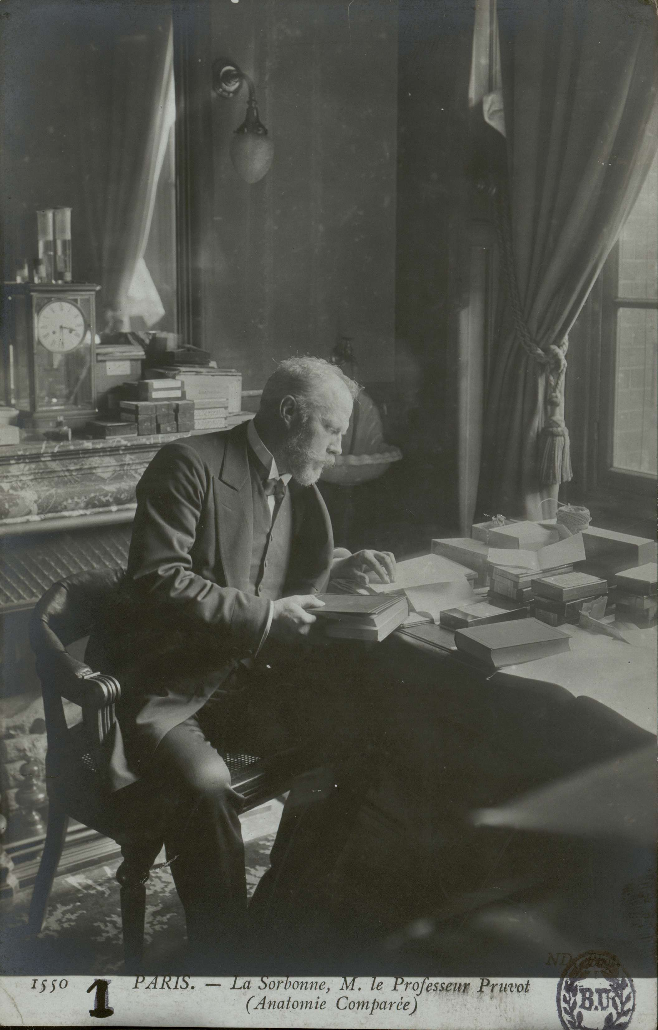 Carte postale photographique